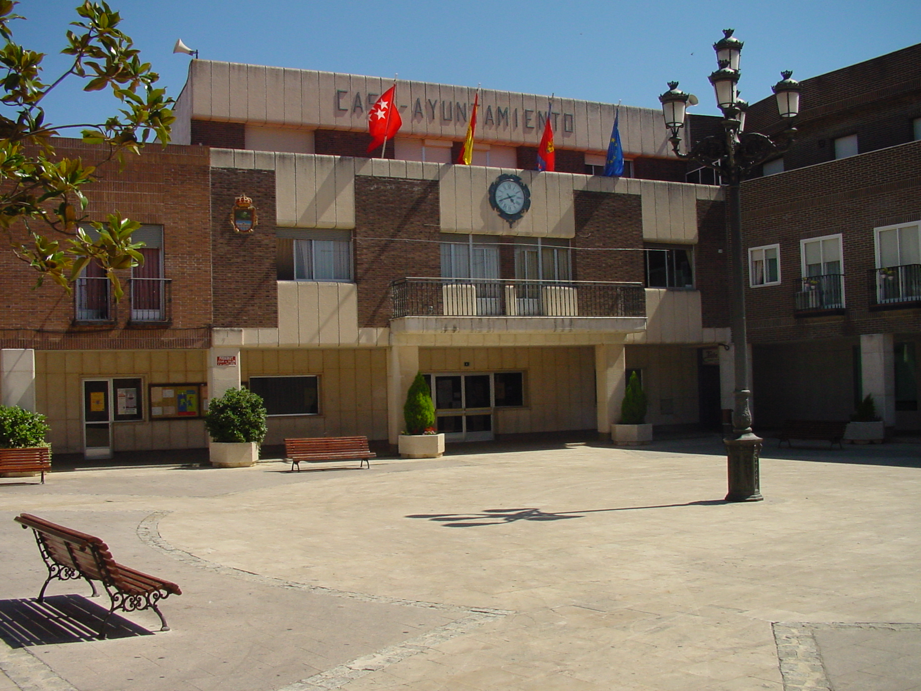 Ayuntamiento de Moraleja de Enmedio.